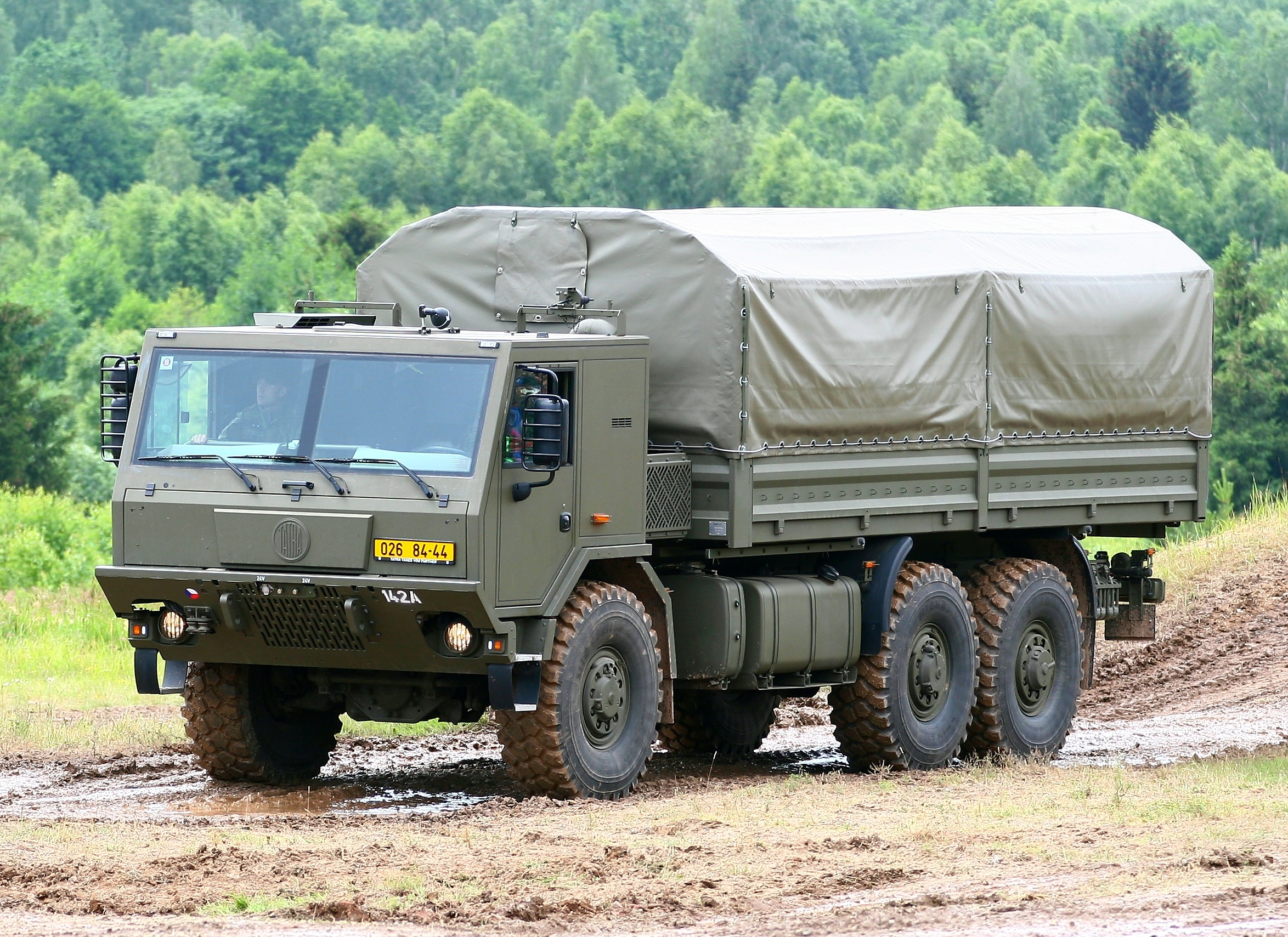 Vojenská technika zaznamenaná při dynamických ukázkách na Dni pozemního vojska BAHNA 2018, který pořádá Velitel společných sil a Nadace pozemního vojska AČR.